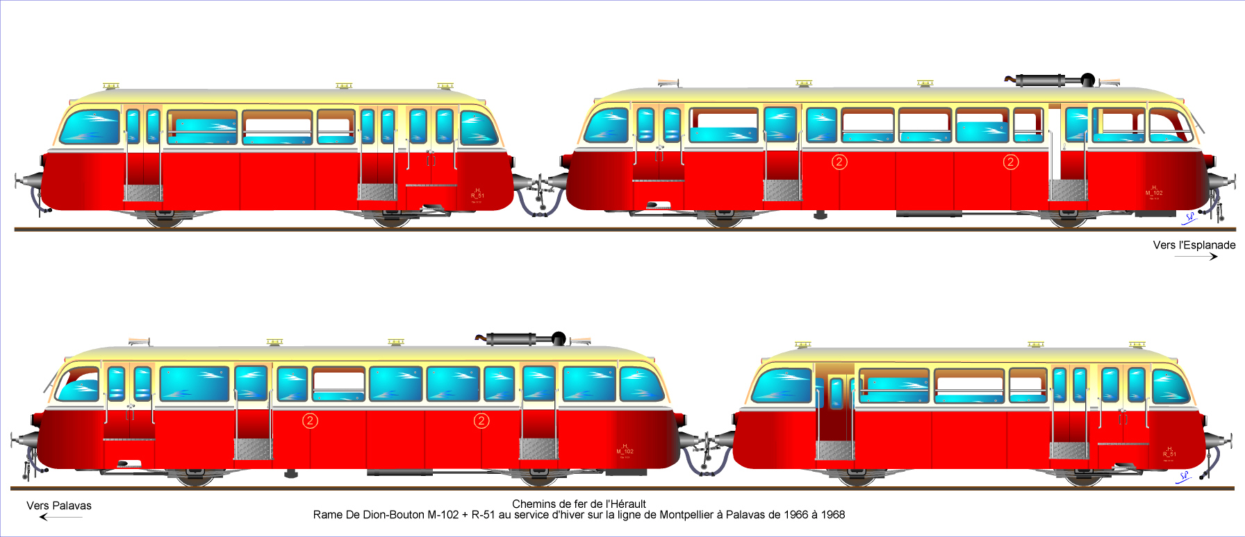 Chemins de fer de l'Hérault - Dessin de la rame De Dion-Bouton M-102 & R-51.